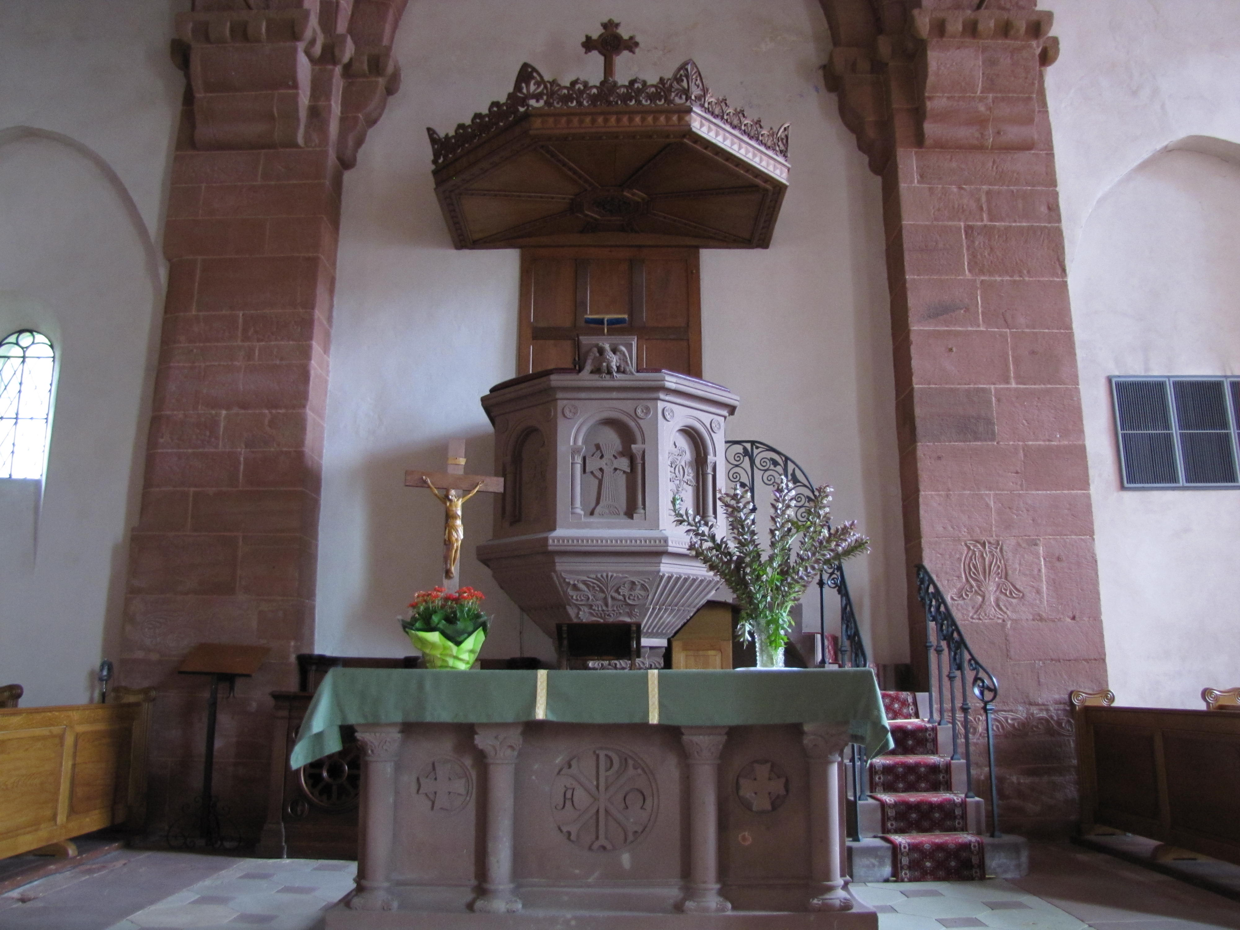 Alsace, Bas-Rhin, Neuwiller-lès-Saverne, Église protestante Saint-Adelphe (PA00084821, IA67009915). Chaire et autel néo-romans (1889)